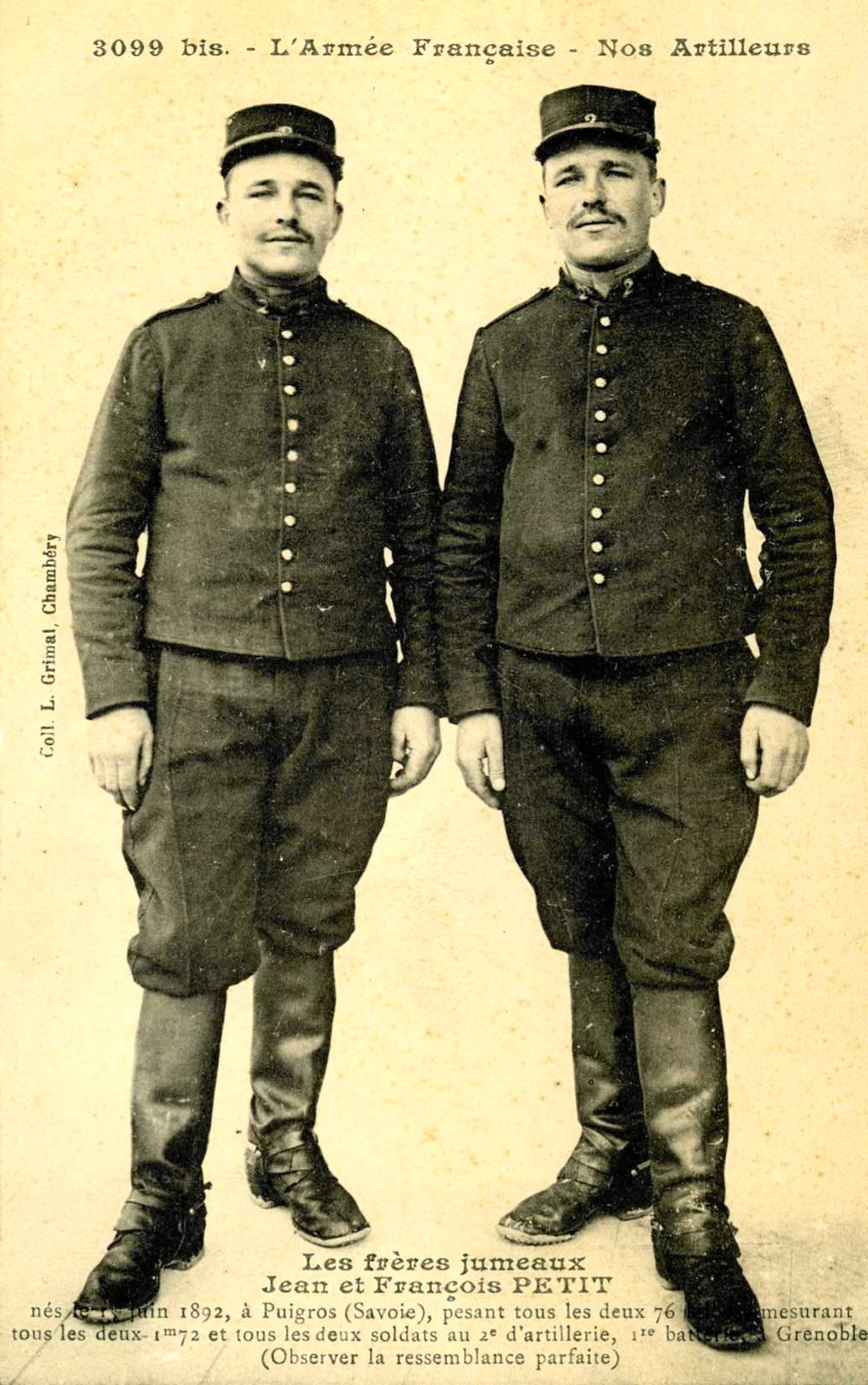 Carte postale ancienne (début 20ème siècle) de deux habitants de Puygros.